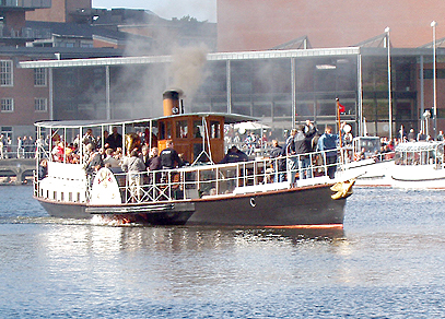 Hjejlen, old steamboat in Silkeborg, Denmark. my foto - Nils Jepsen / User:Nico-dk